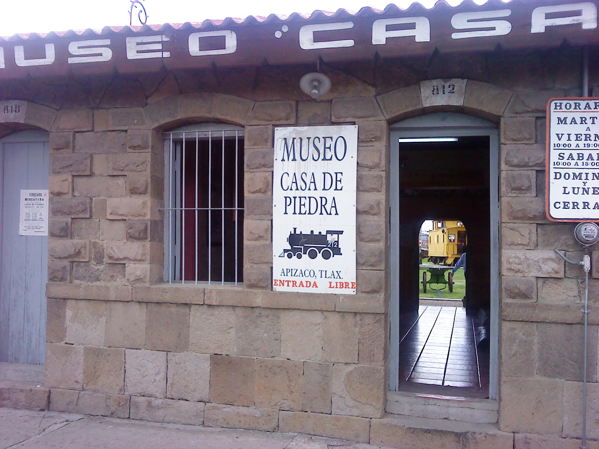 MUSEO CASA DE PIEDRA, FOTOGRAFIA TOMADA PERSONALMENTE